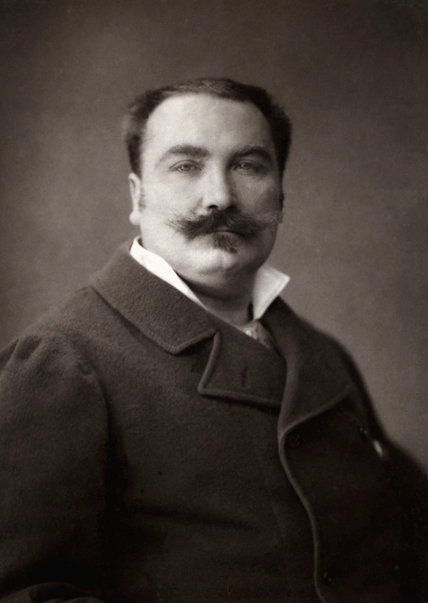 Étienne-Prosper Berne-Bellecour (1838 - 1910), peintre français. Reproduction par photoglyptie (Woodburytype), extrait de Album Artistique et Biographique Salon de 1882 - E. Francfort éditeur.